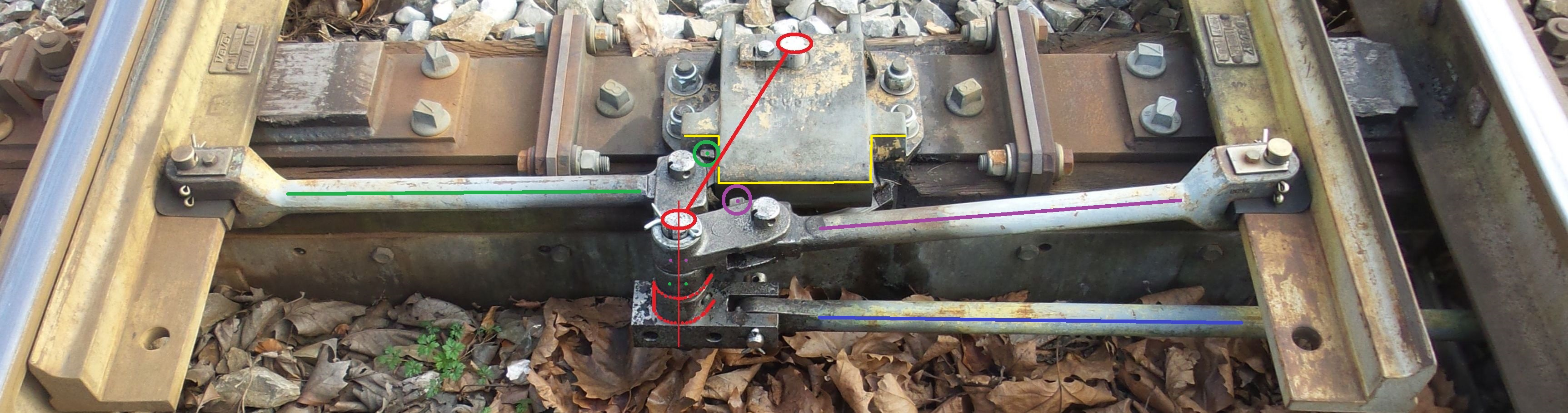 Jüdel-Verschluss mit markierten Einzelteilen der Mechanismen